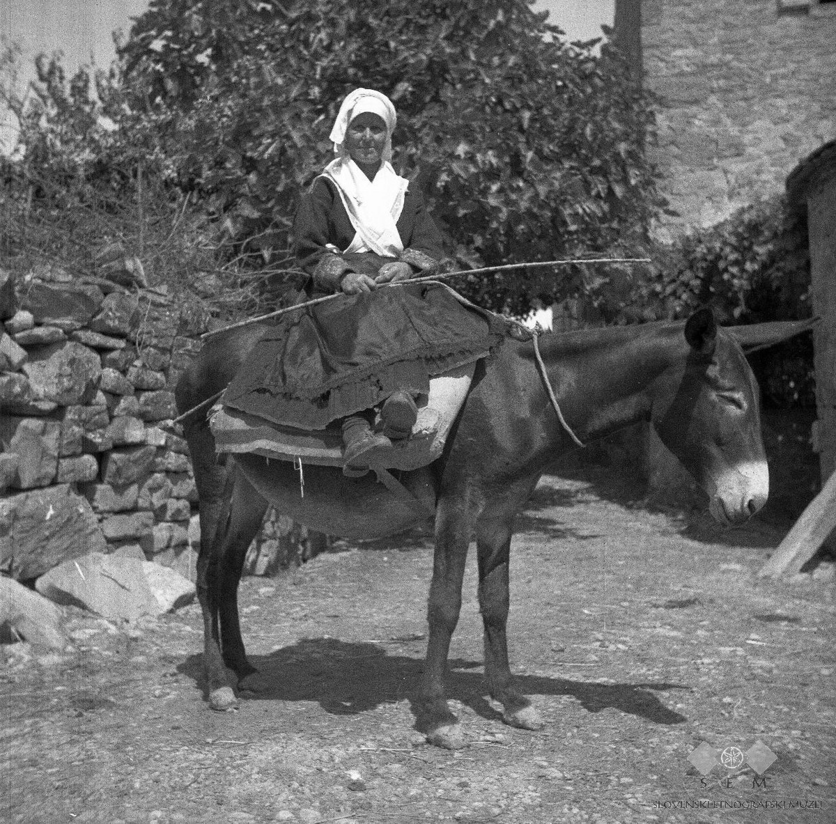 Marija Flego, Labor 31- "se rene na muši".